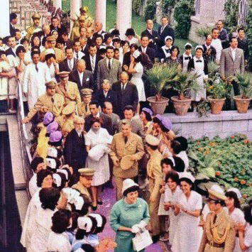 Naissance de Reza Cyrus Pahlavi, 31 octobre 1960